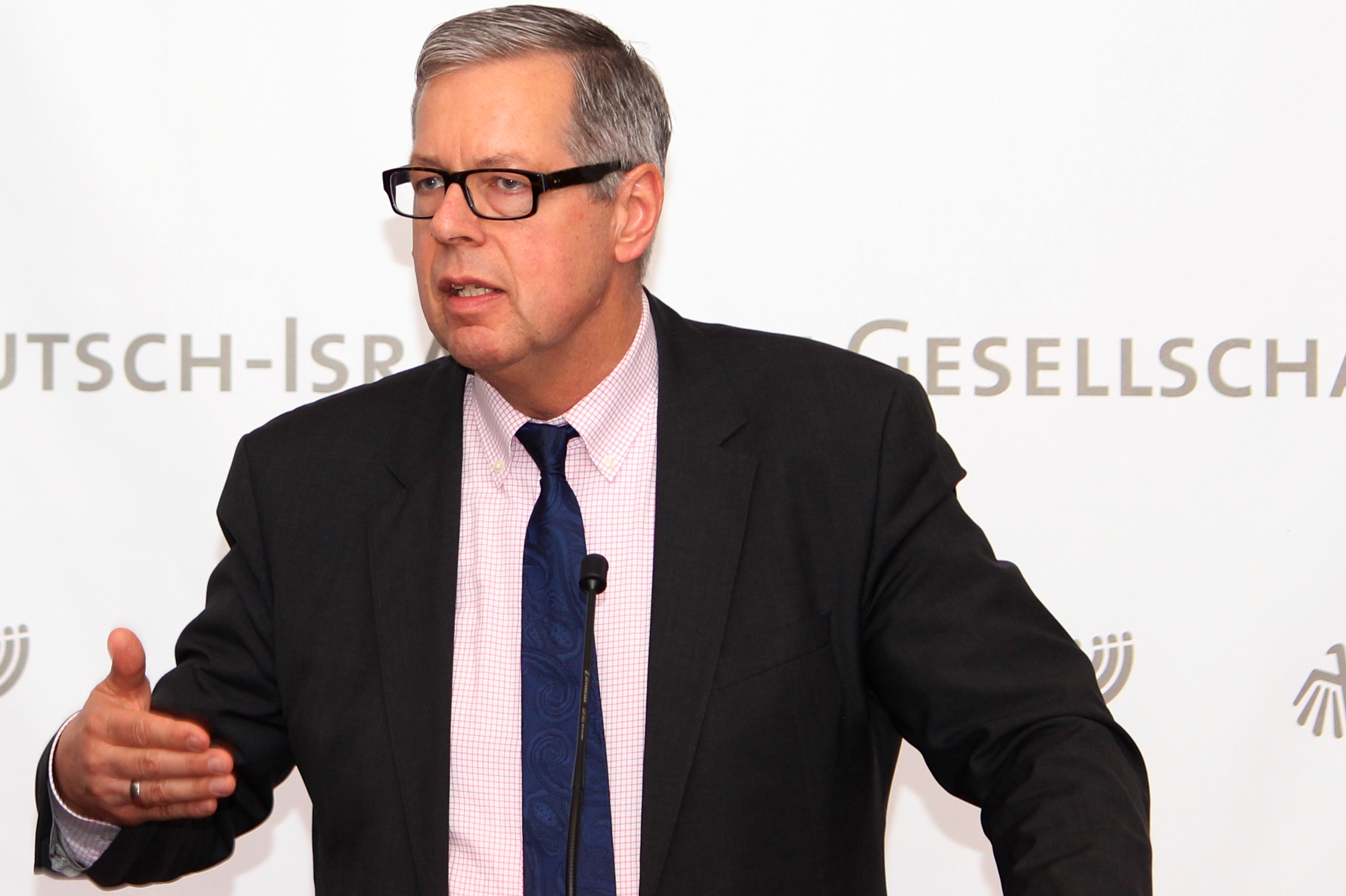 Reinhold Robbe, Präsident der Deutsch-Israelischen Gesellschaft / Reinhold Robbe, president of the German-Israeli Society